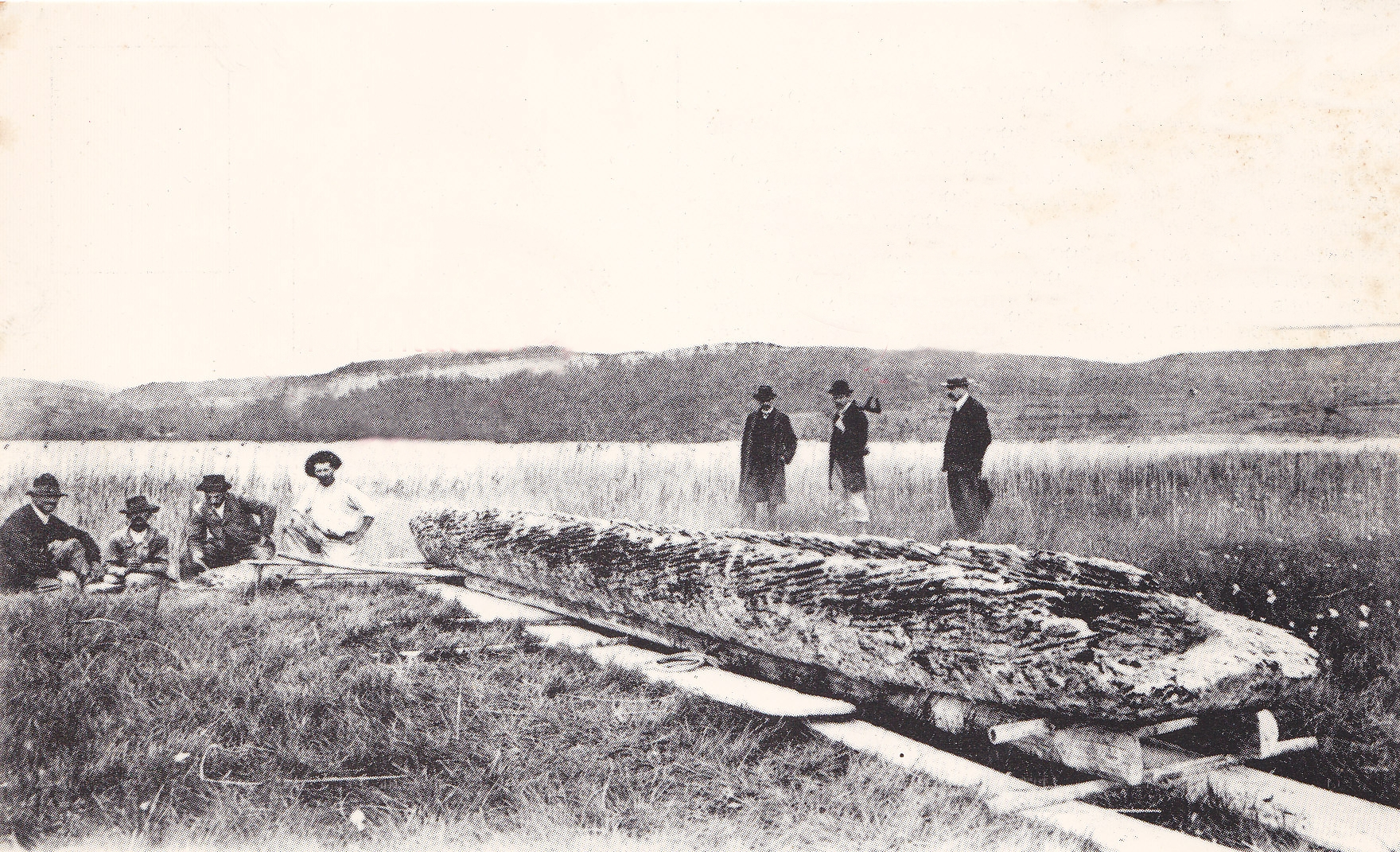 Pirogue du lac de Chalain (Jura – France) : monoxyle (= un seul tronc) de chêne de 9,35 m. Datée par la dendrochronologie, la pirogue aurait été taillée aux environs de l'an 1000 avant J.-C., (en -959 exactement) soit à l'Âge du Bronze final. Découverte en 1904 dans les marnes du lac à la suite de travaux ayant entraîné la baisse du niveau de l'eau, la pirogue est aujourd'hui au Musée archéologique de Lons-le-Saunier. Scan d'une photo d'époque (1904) tombée dans le domaine public.